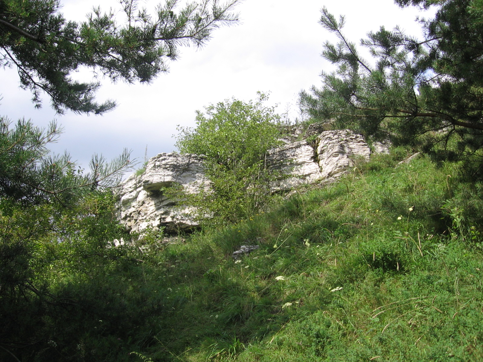 Skały wapienne w Psarach